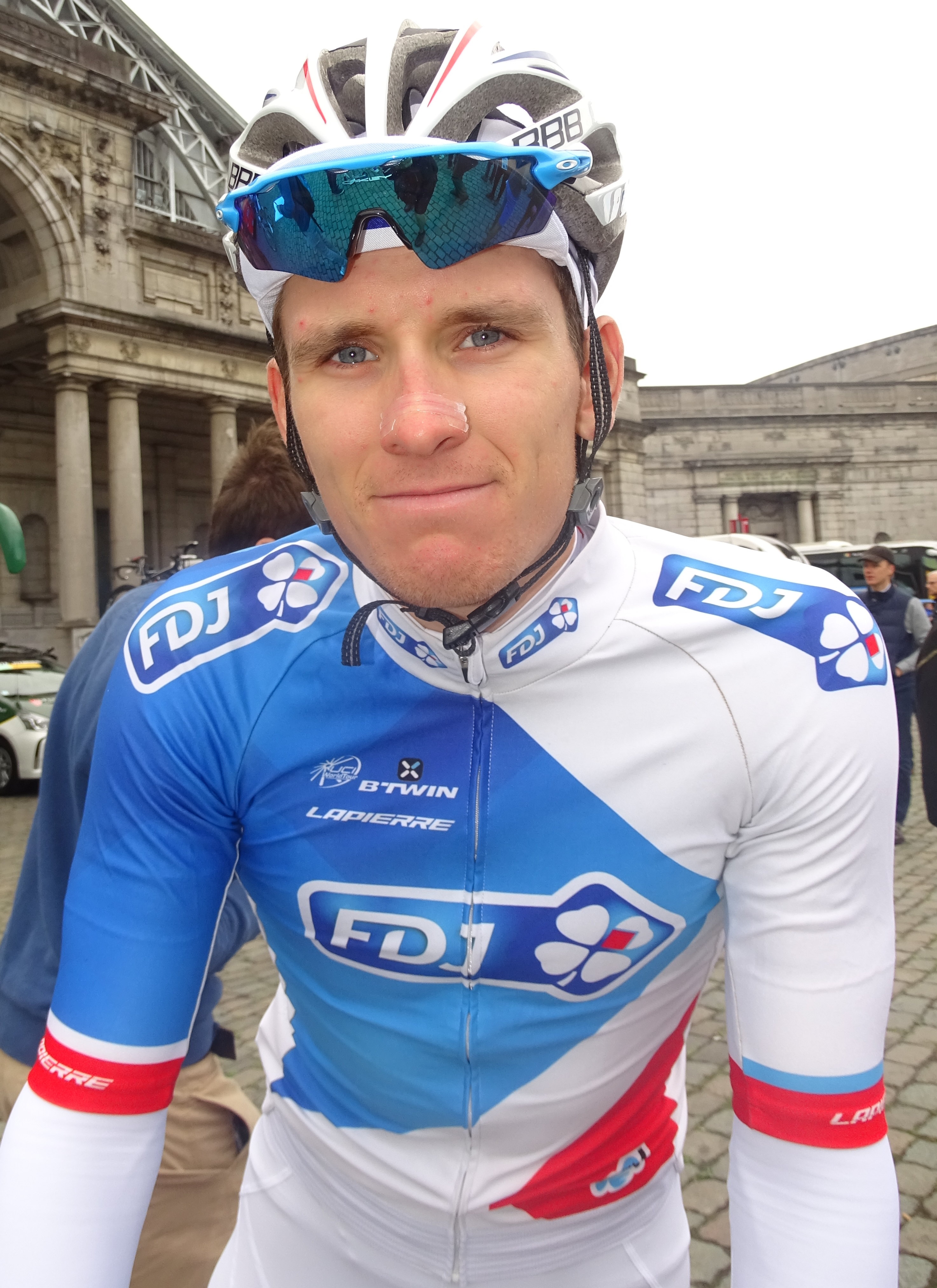 Brussels Cycling Classic 2015.